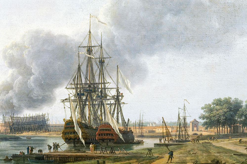 Vue du port de Rochefort (détail), peinture de Joseph Vernet